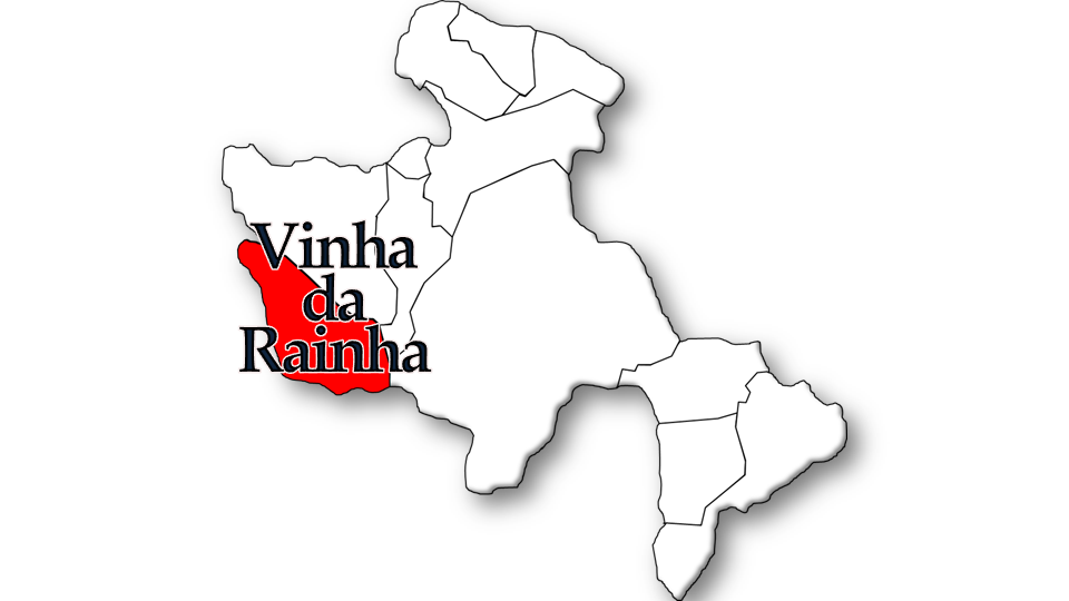 População